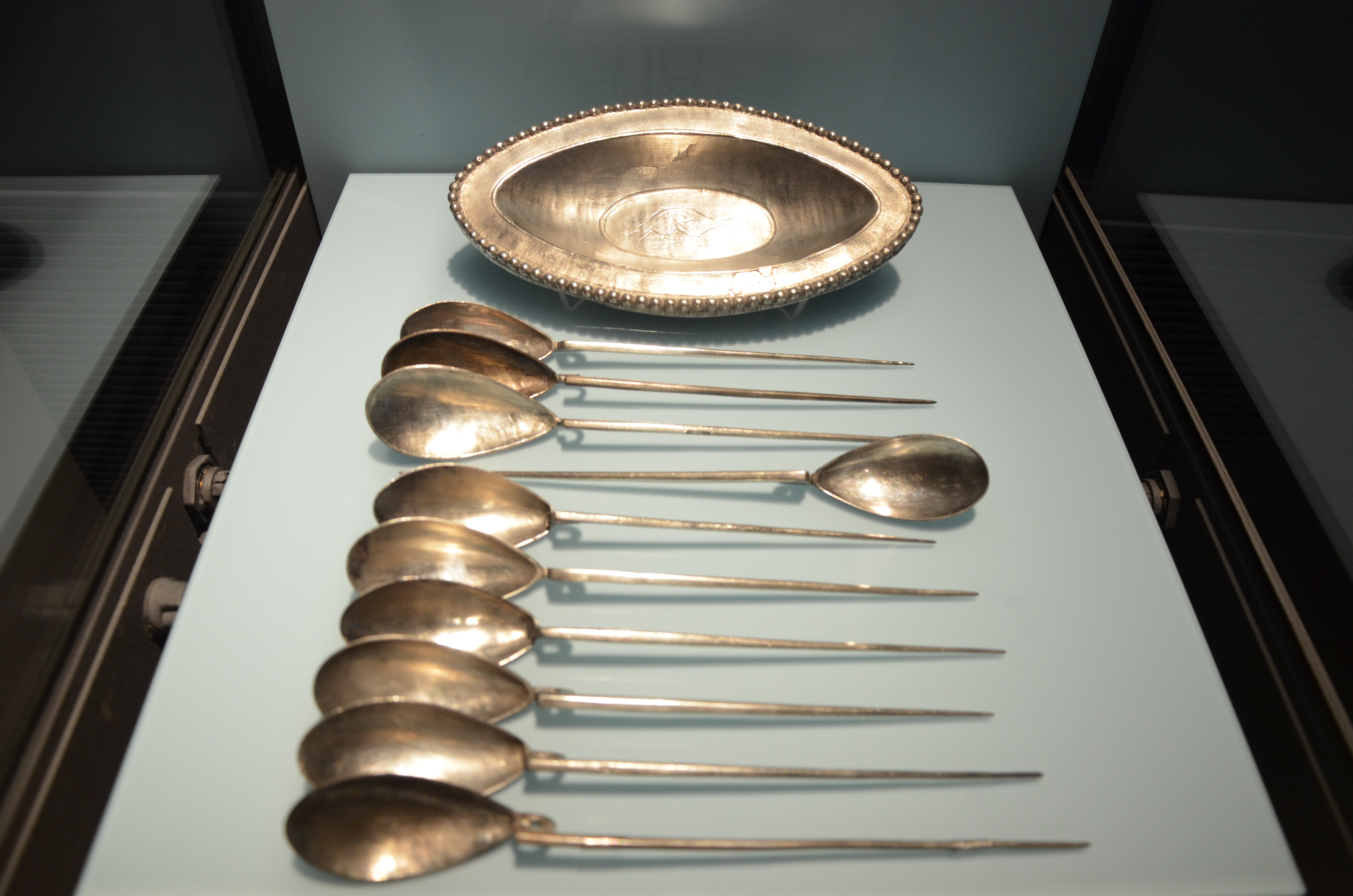 Augusta Raurica, Switzerland